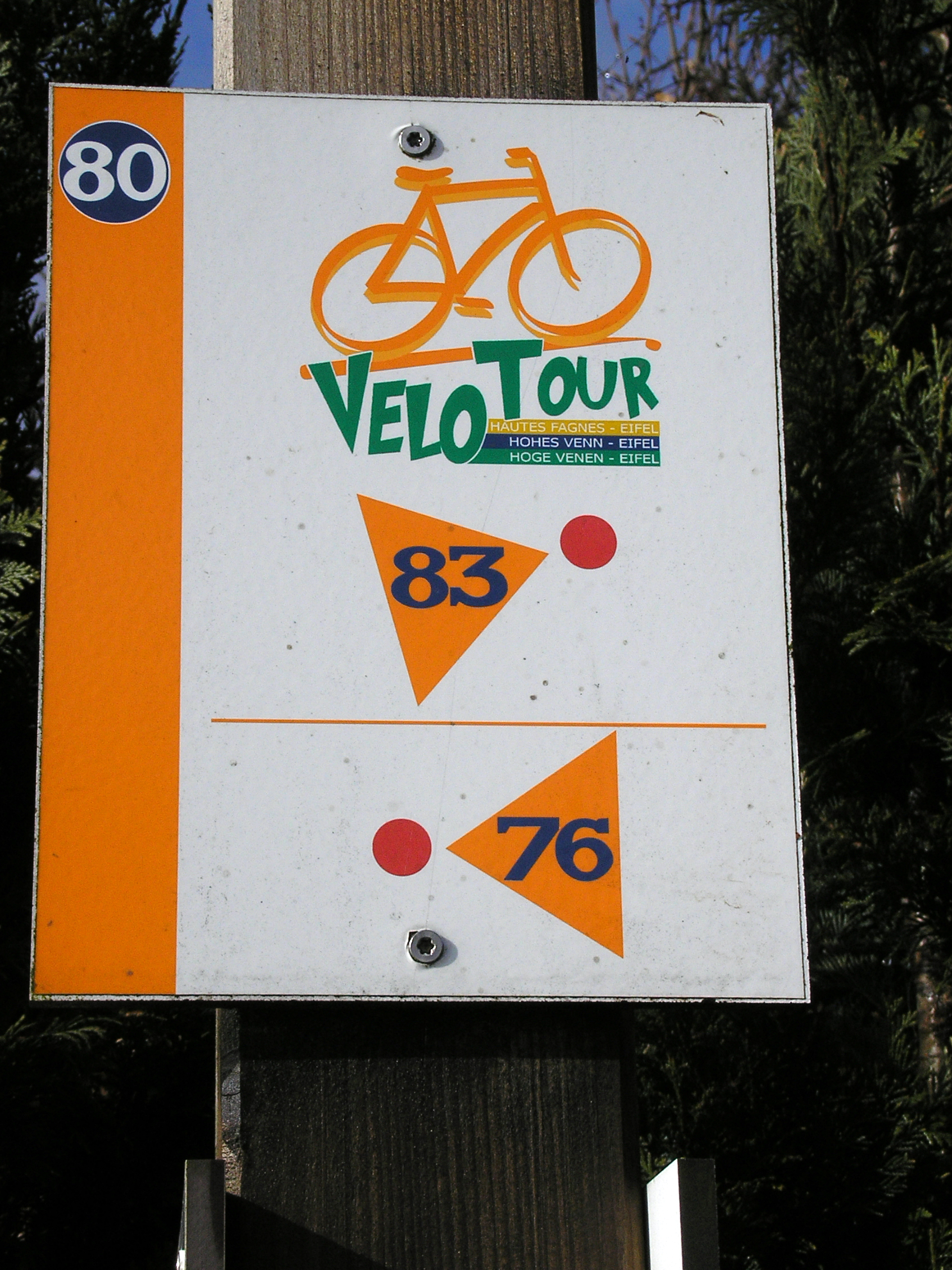 Knotenpunkt 80 in Sourbrodt, East Belgium